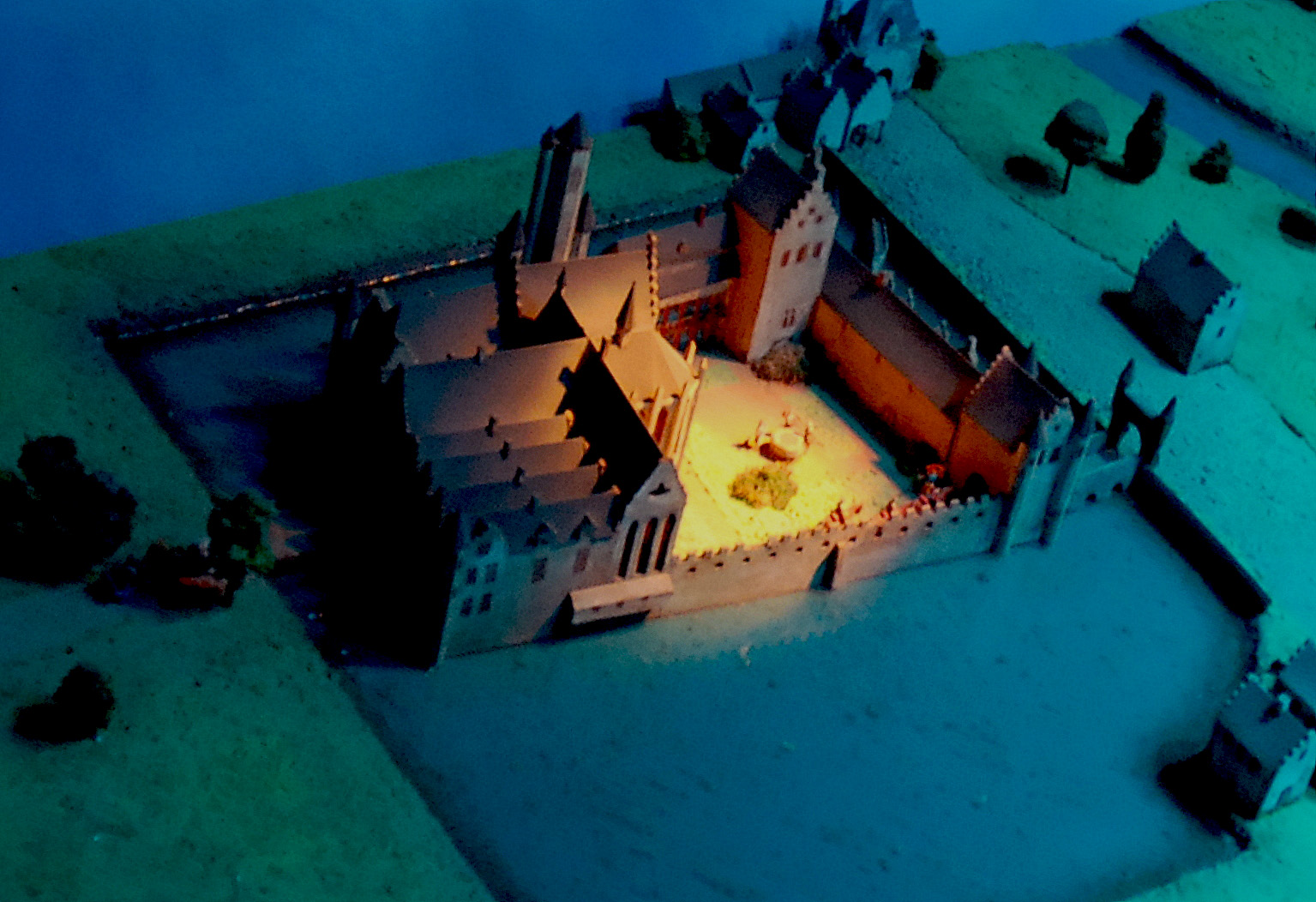 Maquette van het Prinsenhof van Gent in het museum "de wereld van Kina" te Gent, België